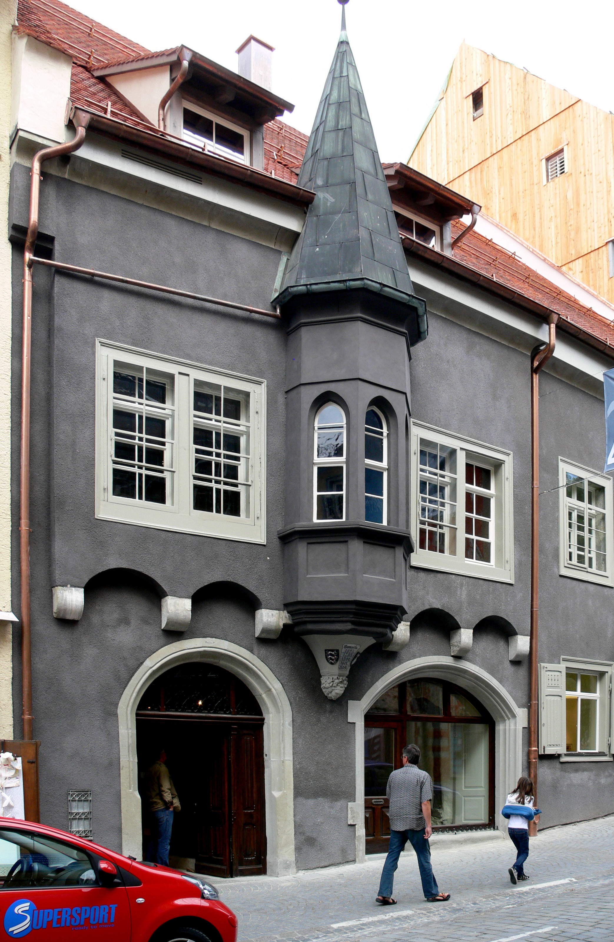 Museum Humpisquartier, Ravensburg Gebäude Marktstraße 45 mit Haupteingang